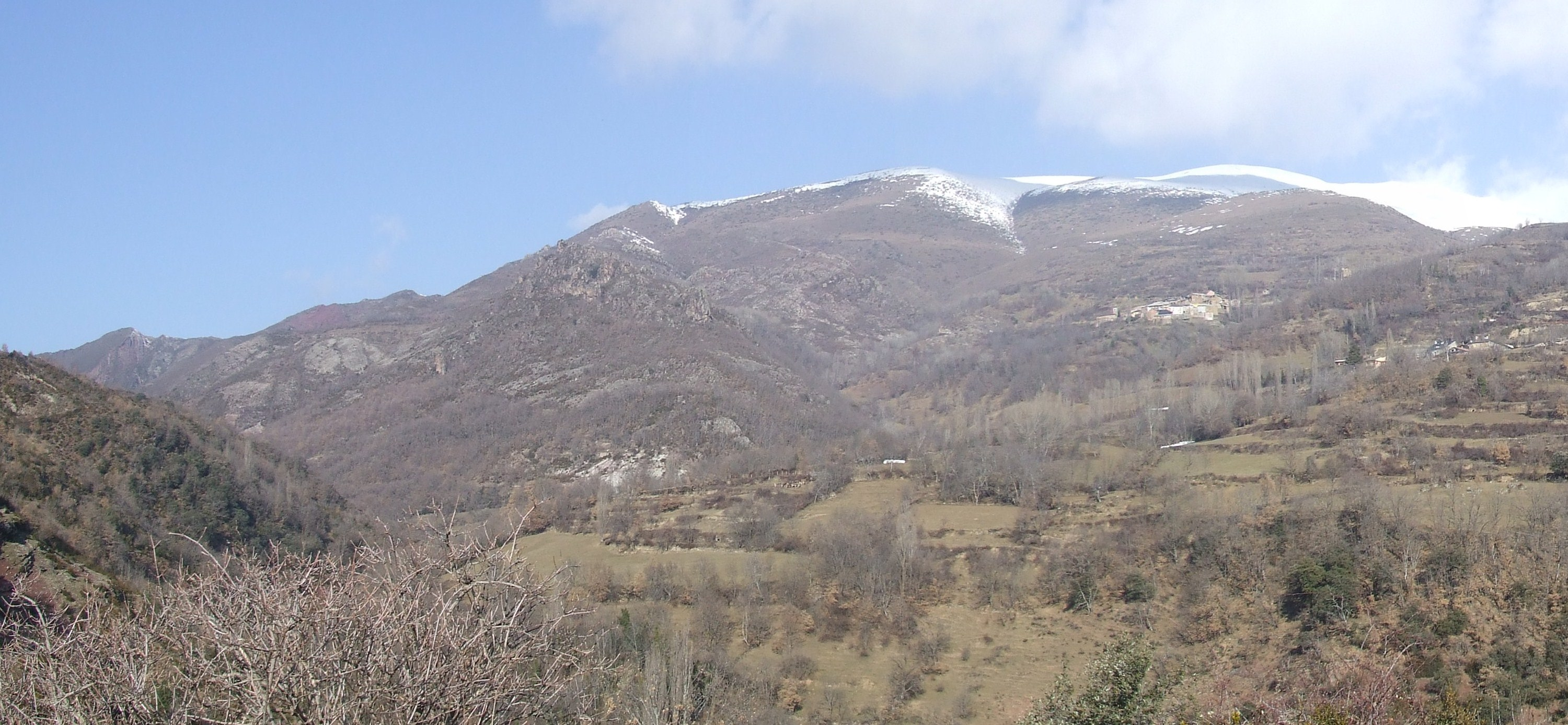 Serra de Castellnou, Serra de la Pala i Tossal de les Comes de Guiró (la Torre de Cabdella, Pallars Jussà)